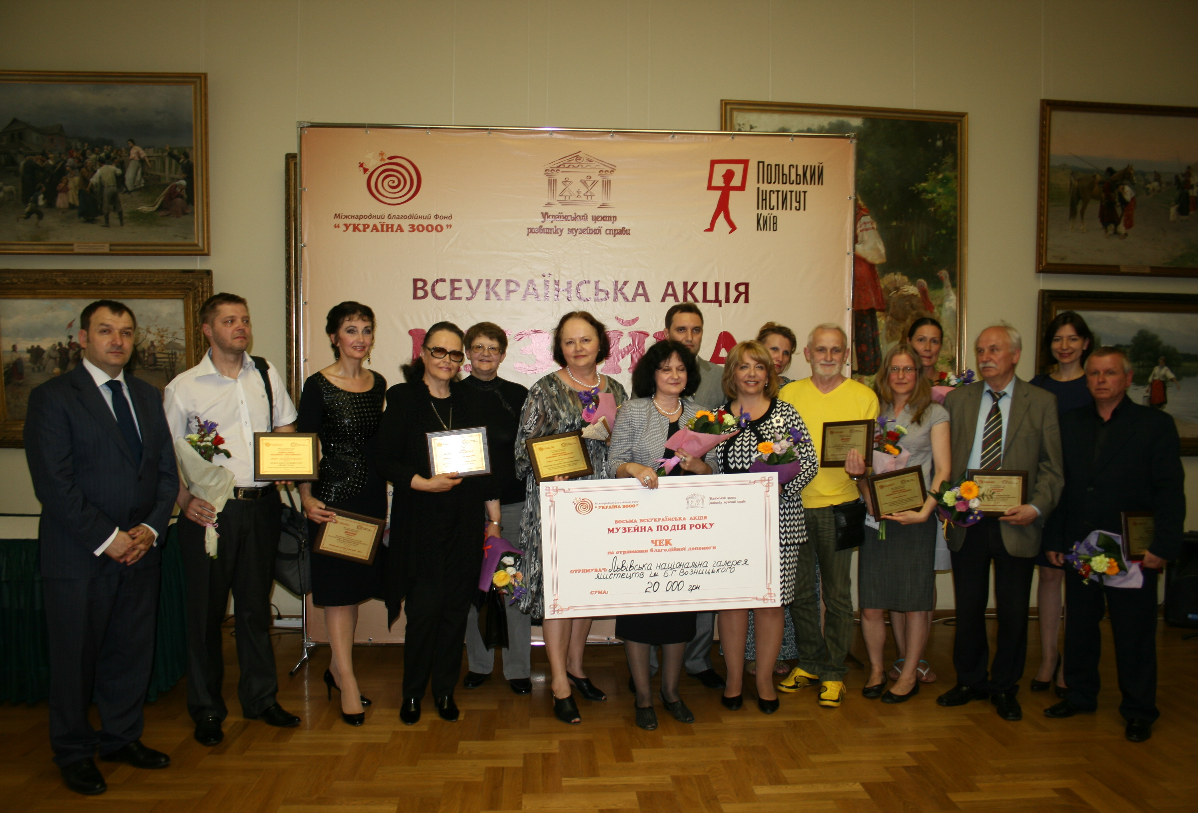 Нагородження Музейна подія року - 2013